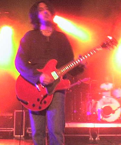 Cédric Floc'h guitariste du groupe Matmatah.